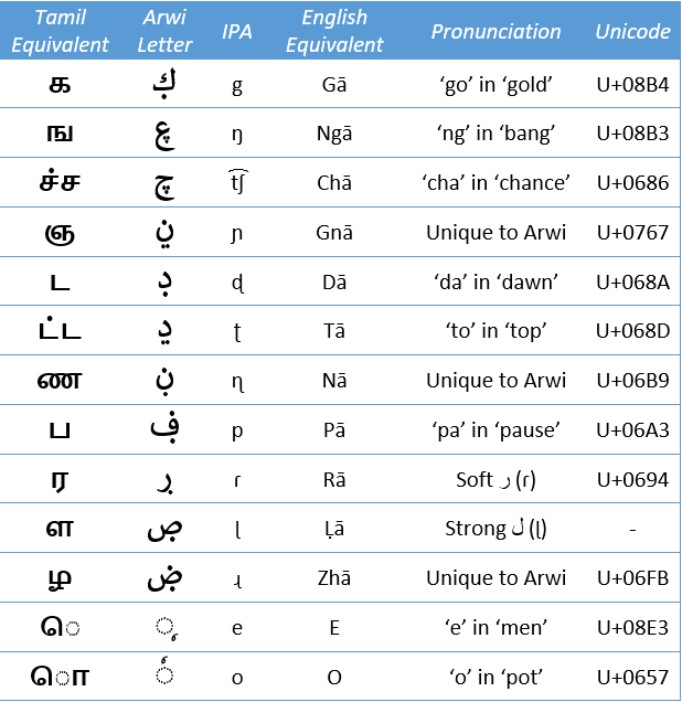 Tabel yang menunjukkan Abjad Arab Tambahan yang digunakan untuk menulis Aksara Arwi